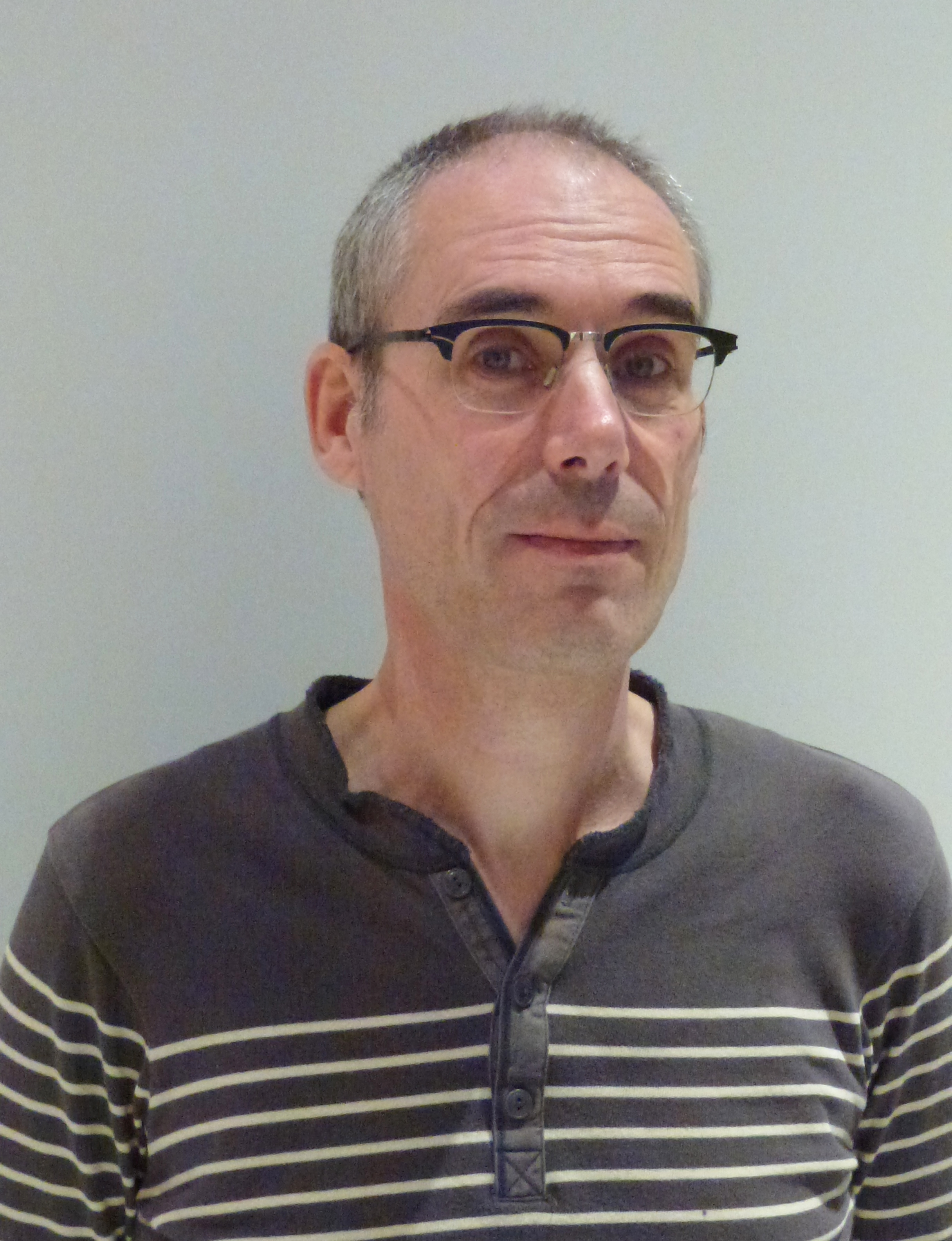 Wouter van Reek, is animator filmer, kinderboekenschrijver en illustrator. De foto is genomen in de Goudse Bibliotheek tijdens de kinderboekenweek 2015